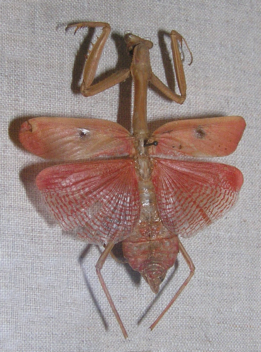 Stagmomantis dimidiata, female syn. Stagmomantis carolina